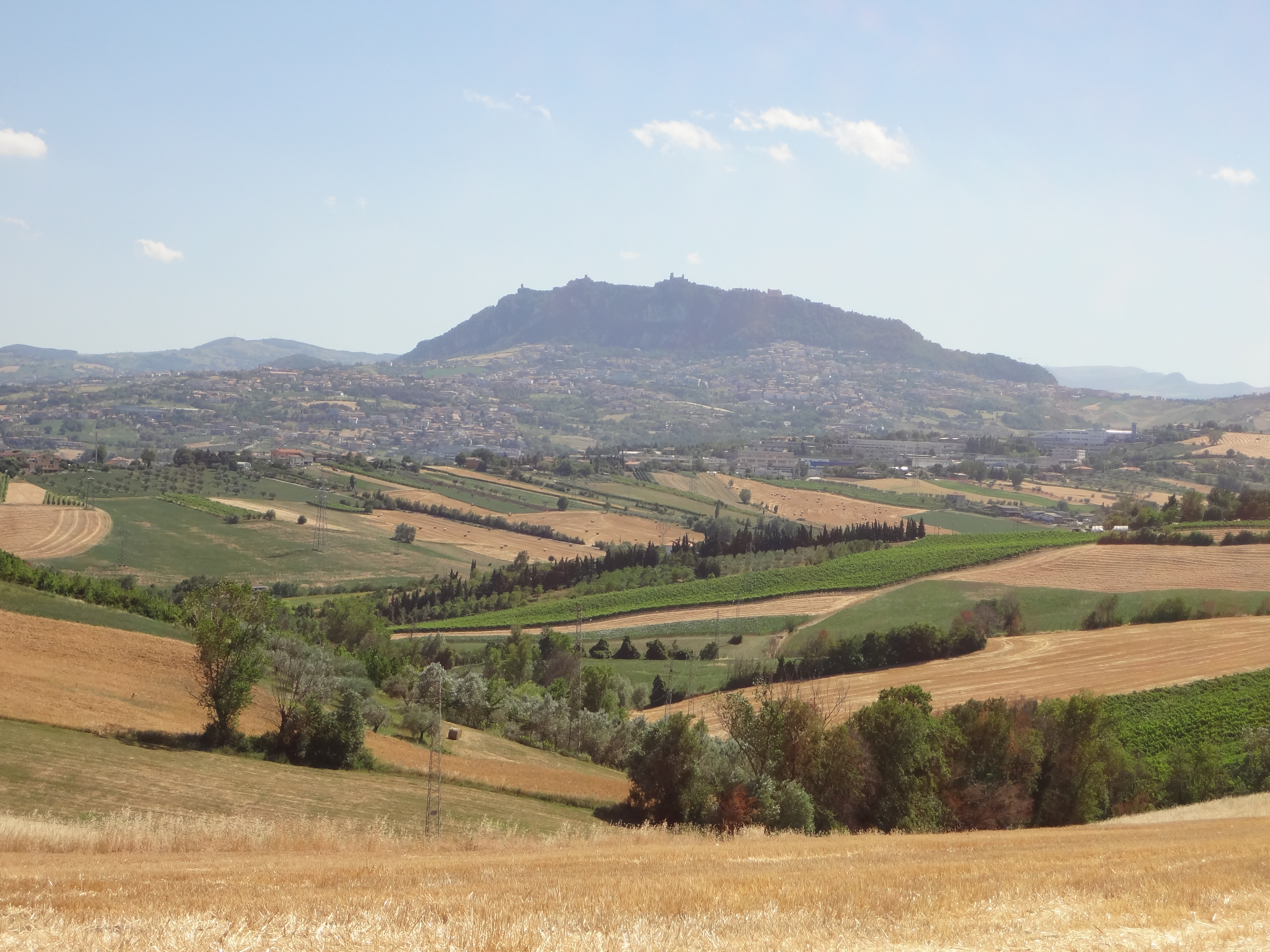 Montecieco di Rimini: Se ti guardi intorno dal crinale di Montecieco, non puoi che contemplare la natura. E' estate e San Marino svetta in lontananza contornata da campi coltivati